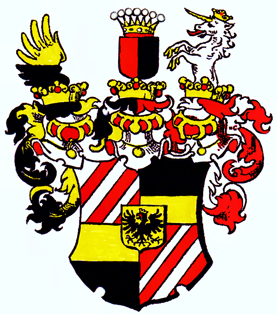 Wappen der Freiherrn von Regner-Bleyleben 1790/1911